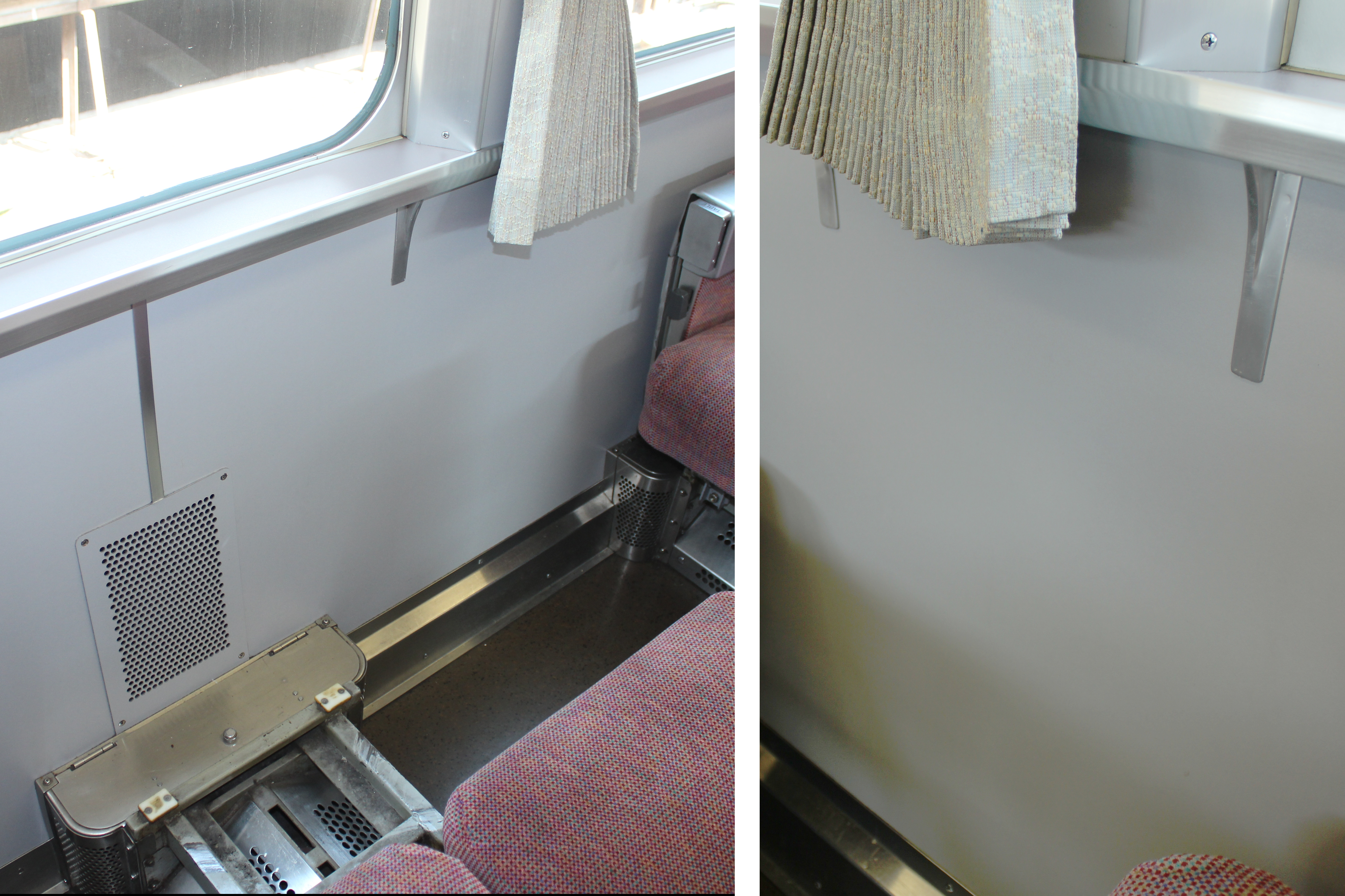 近鉄12410系更新車 車内